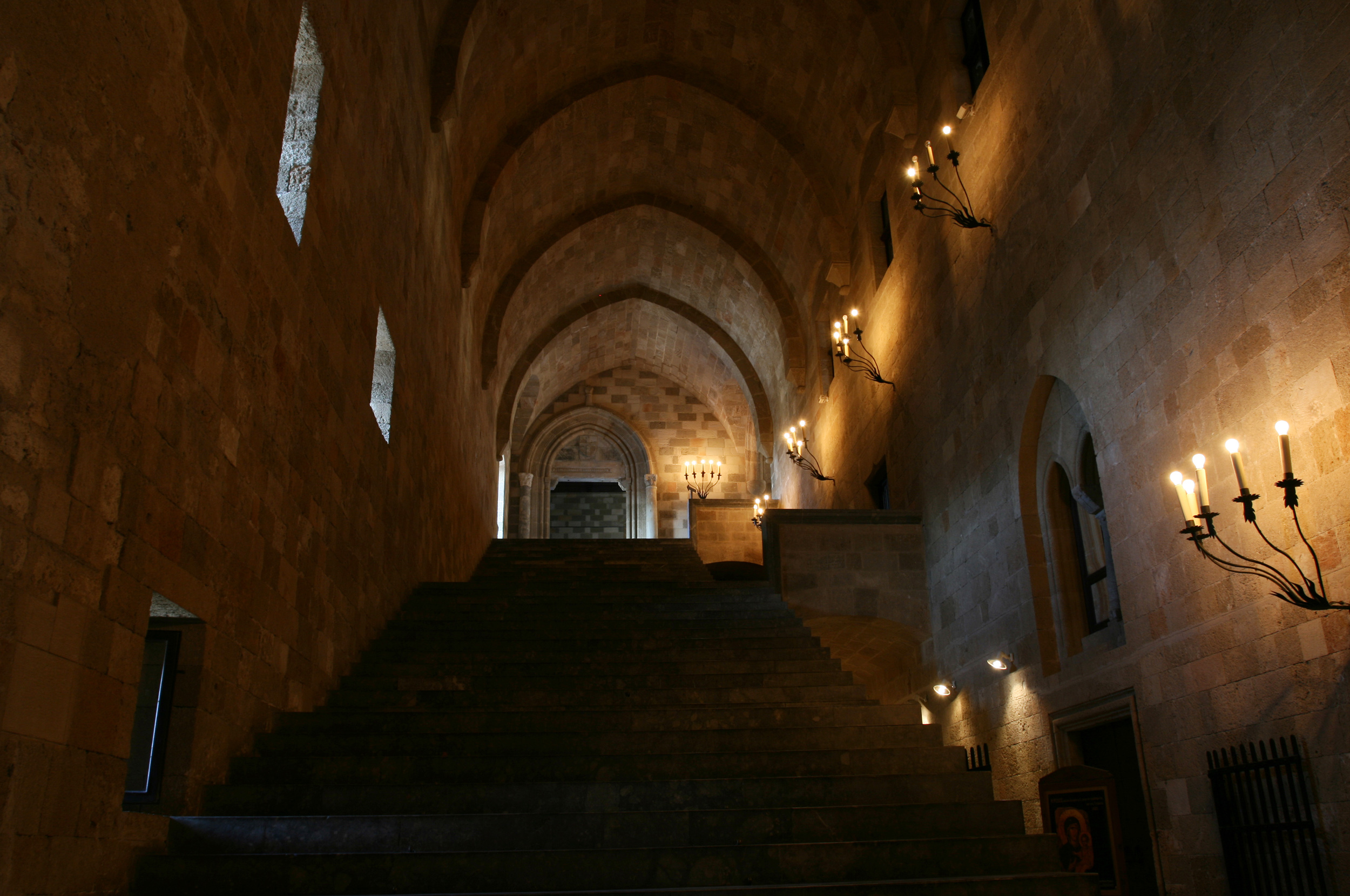 Μεσαιωνική πόλη Ρόδου«Μεσαιωνική πόλη Ρόδου»